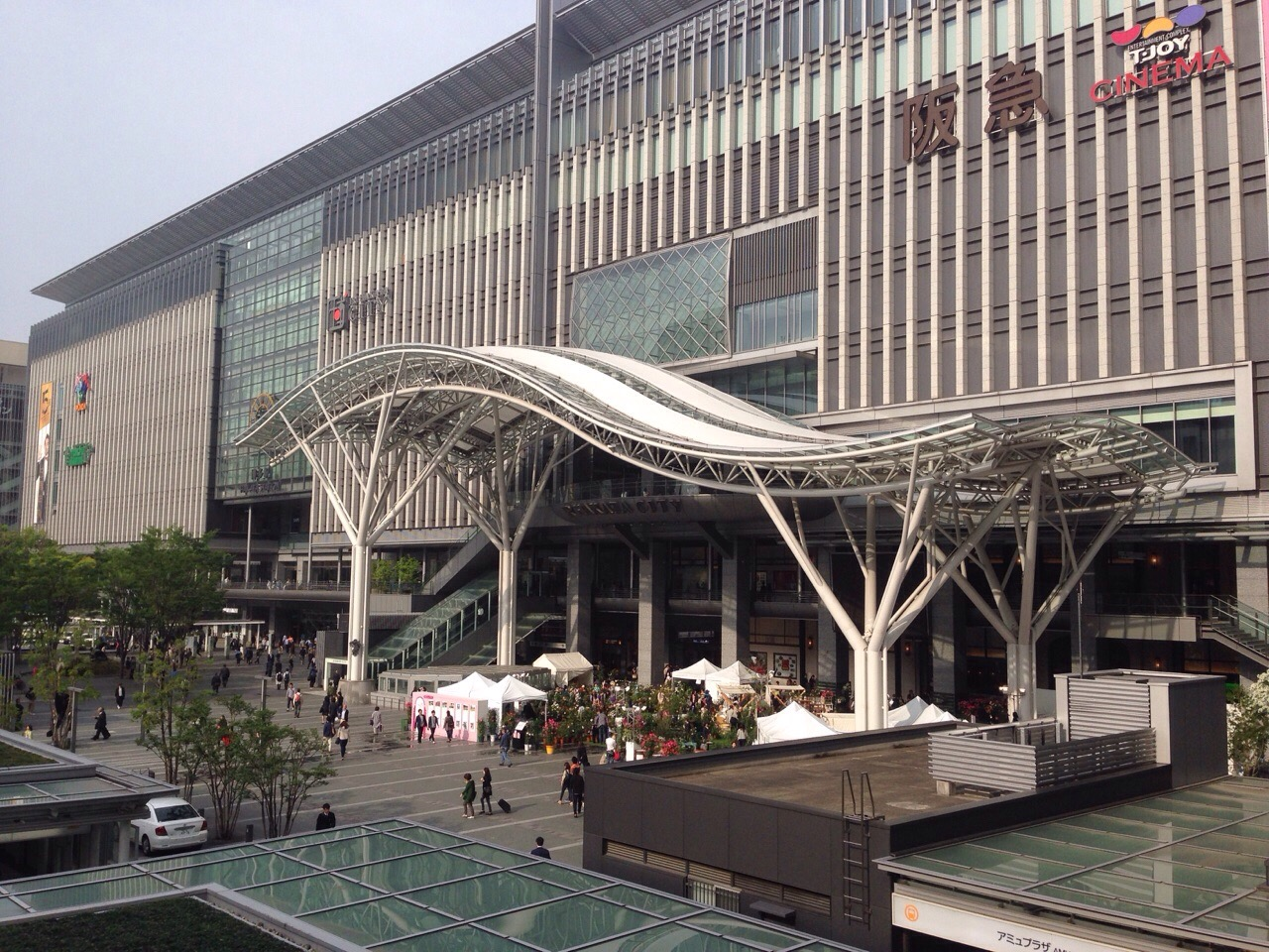 JR Hakata City